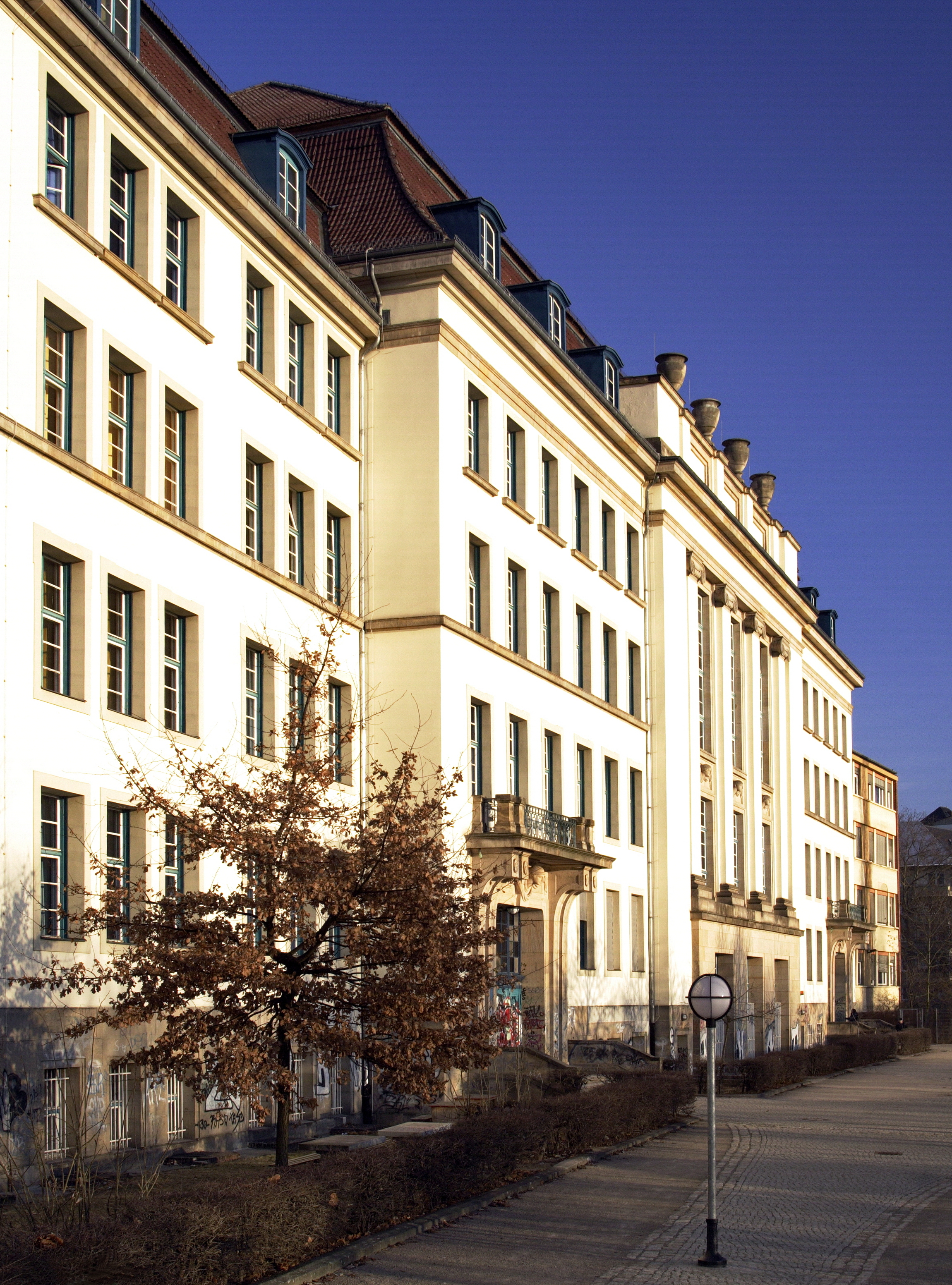 Schulansicht heute